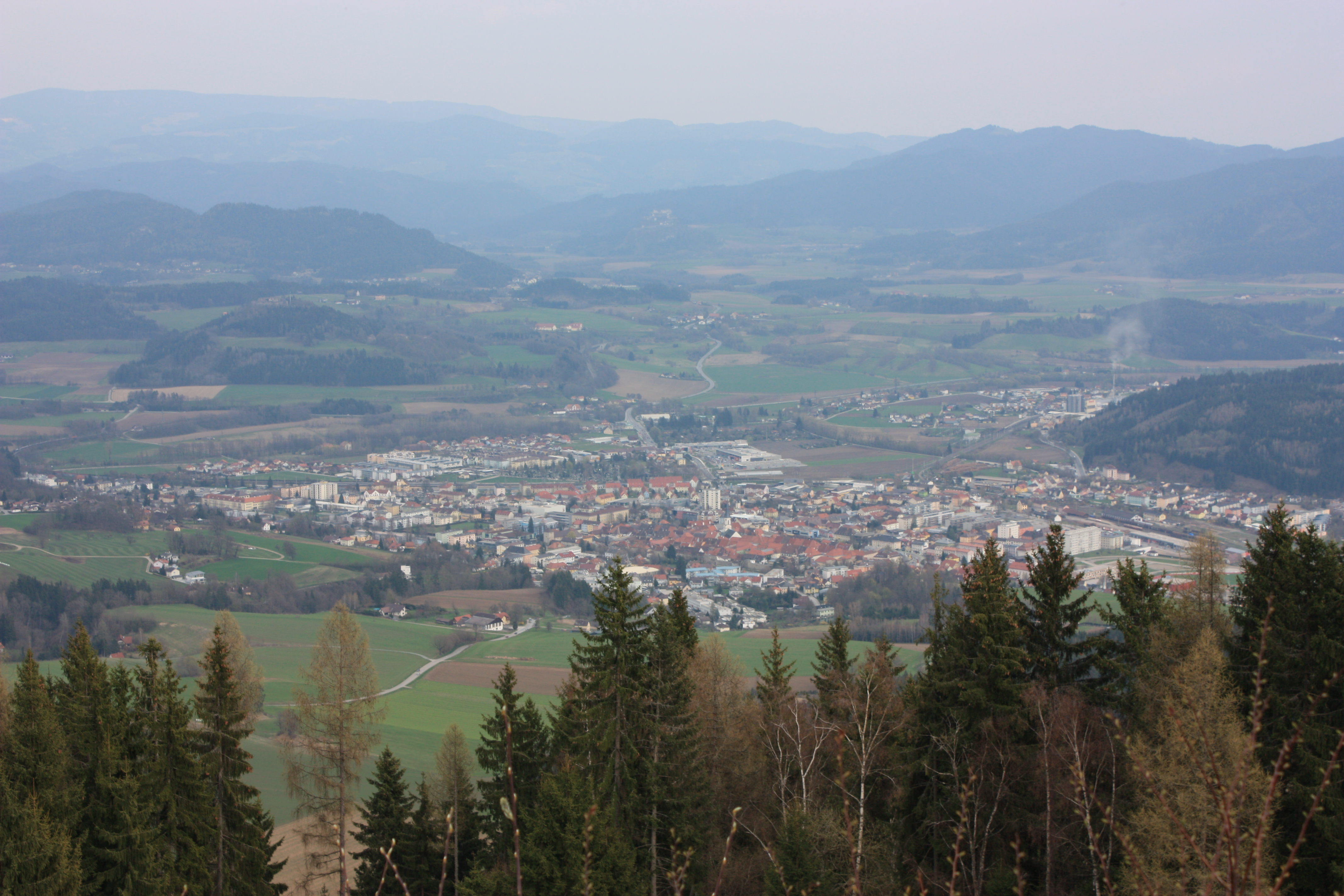 Blick vom Lorenziberg auf St Veit an der Glan